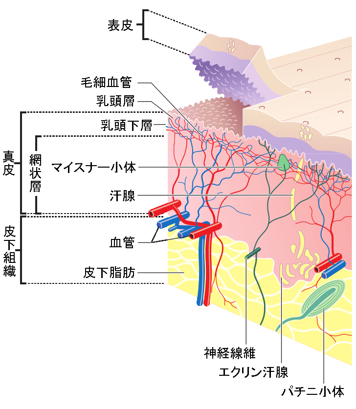 File:Skin layers.pngを日本語訳し作成。